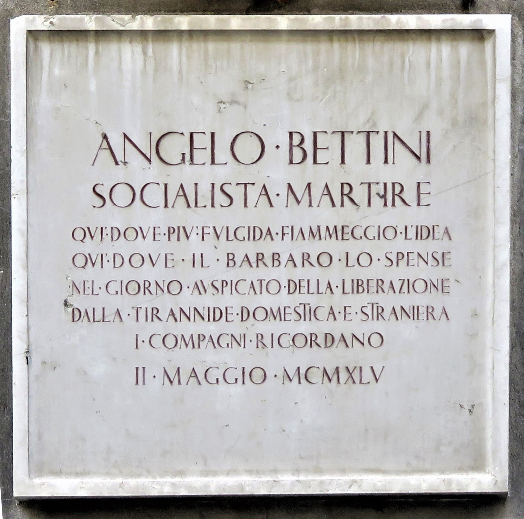 Targa Angelo Bettini su Casa Testori poi Candelpergher a Rovereto